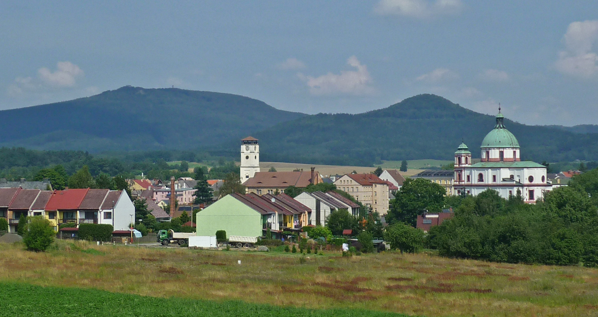 Blick auf Deutsch-Gabel (Jablonné v Podještědí) mit der Basilika Hl. Laurentius und Hl. Zdislawa und den Hochwald (Zittauer Gebirge)